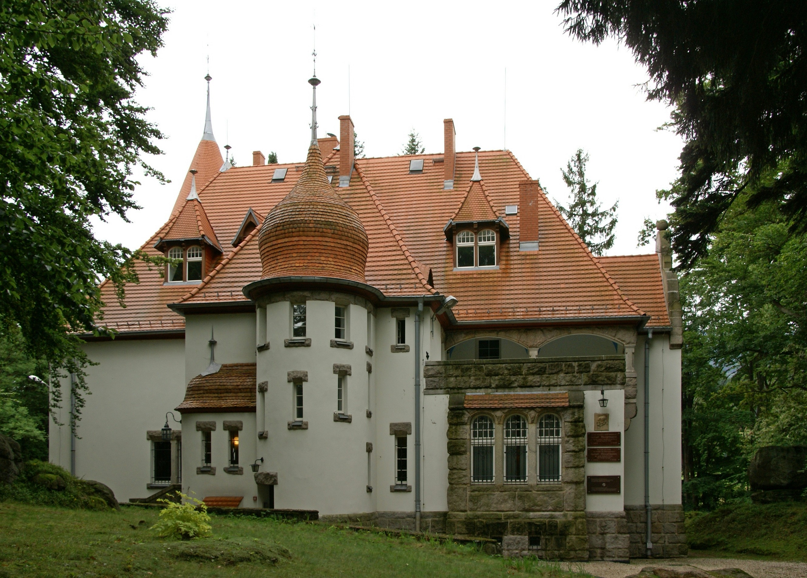 Jagniątków - Muzeum Miejskie "Dom Gerharta Hauptmanna".